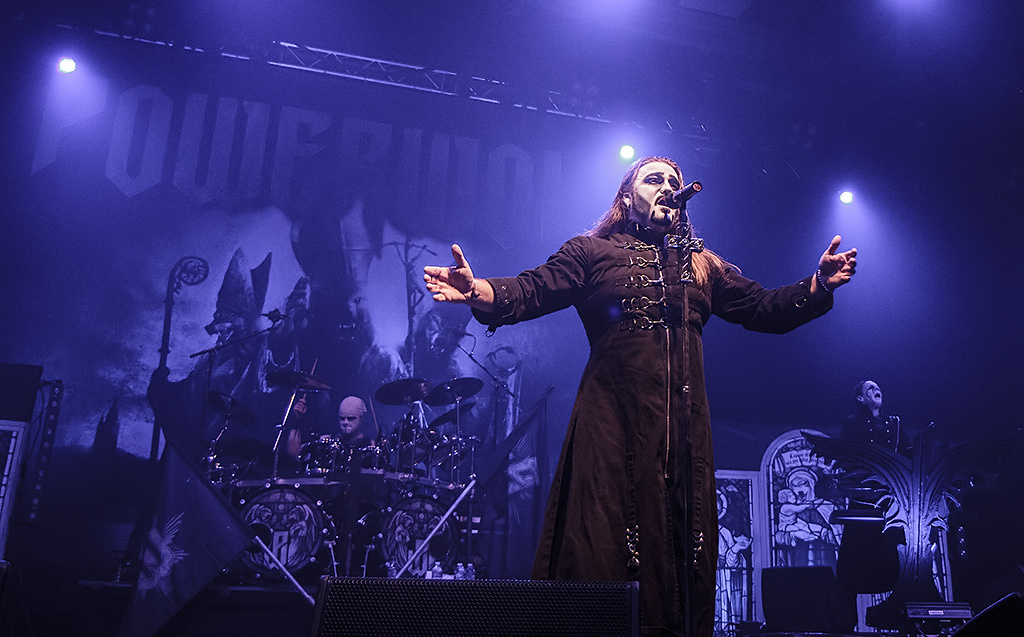 Powerwolf - 15.12.2012 - Knock Out, Karlsruhe